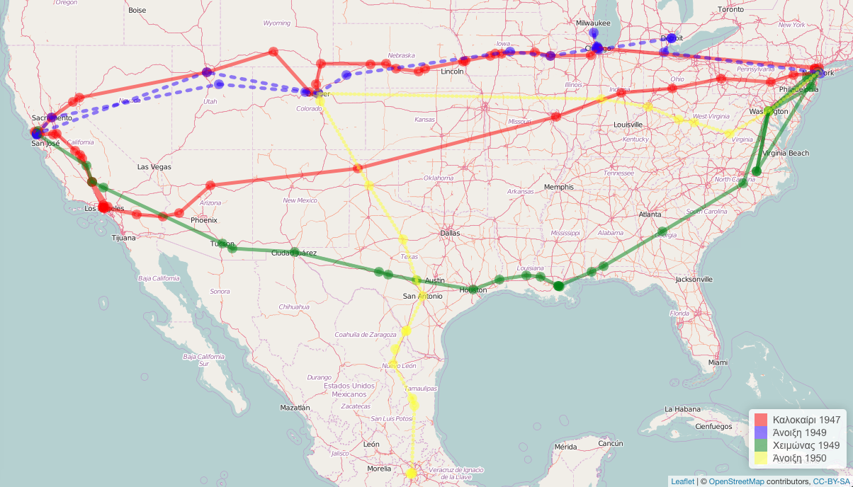 Ταξιδιωτικές διαδρομές που ακολούθησε ο Κέρουακ την περίοδο 1947-1950 και περιέγραψε στο δεύτερο μυθιστόρημά του Στο δρόμο (1957).